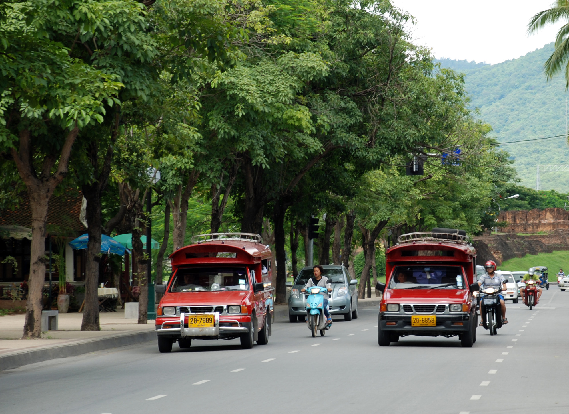 การจราจรในเมืองเชียงใหม่